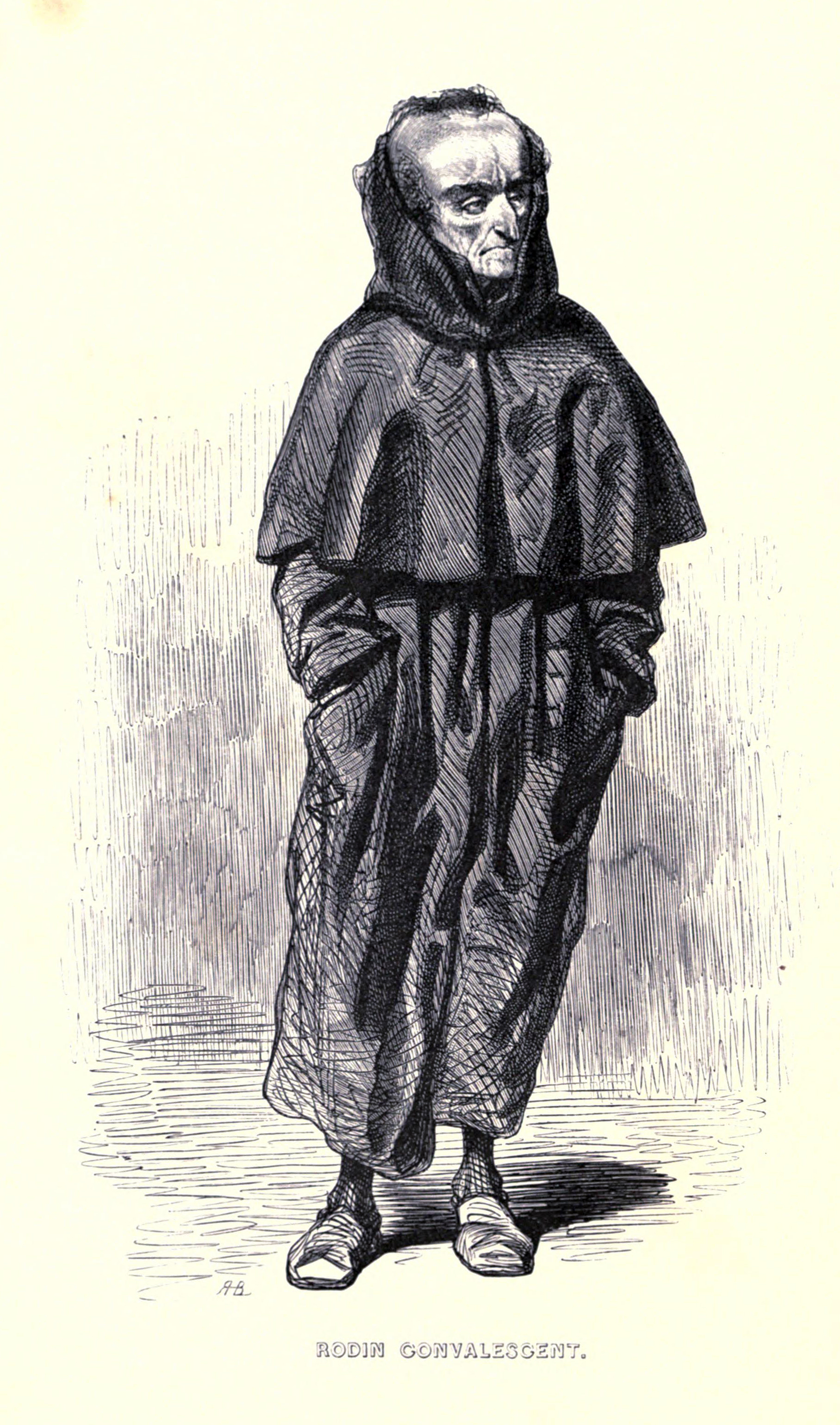 Illustration of Le Juif errant.